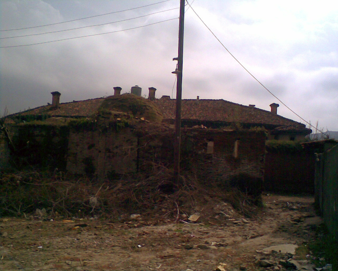 گیلکی: خرابابه صوفی شونه حموم-املش